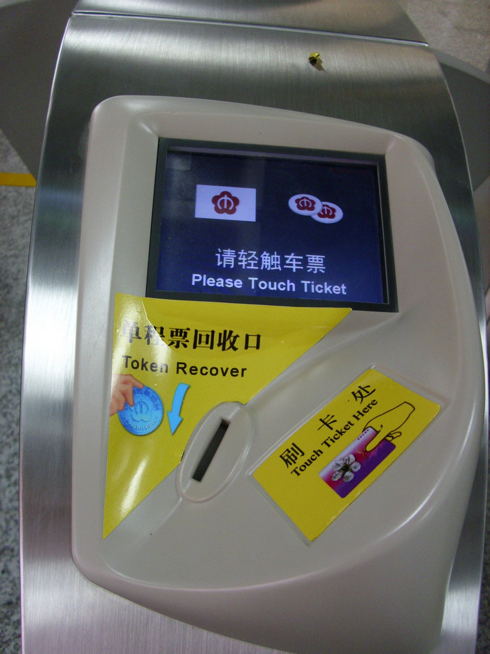 南京地铁2号线 出站闸机特写